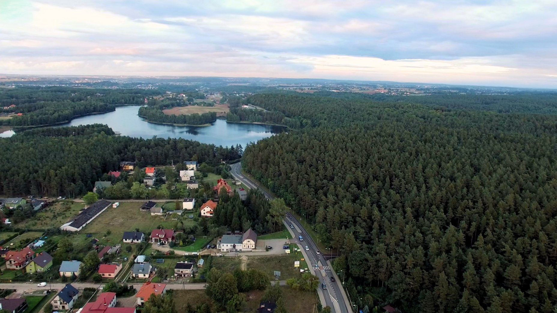 Widok od strony Kartuz w kierunku Żukowa